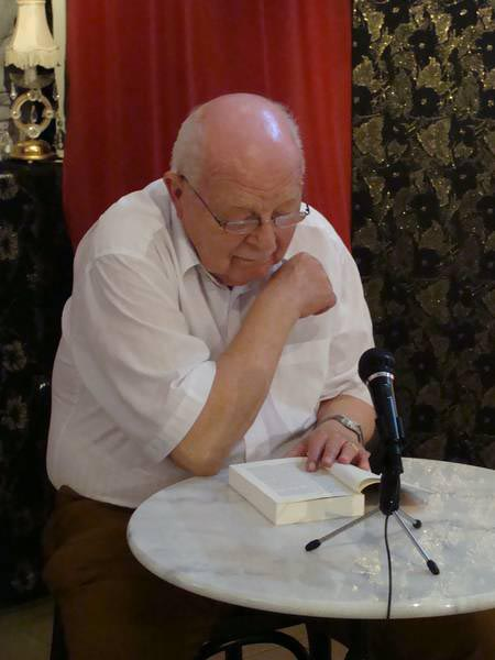 Alfred Heinrich bei der Buchpräsentation "Und ewig raunzen die Wiener" im "Kultur & Café / Club 15" Bezirksmuseum Rudolfsheim-Fünfhaus am 8. Juni 2009